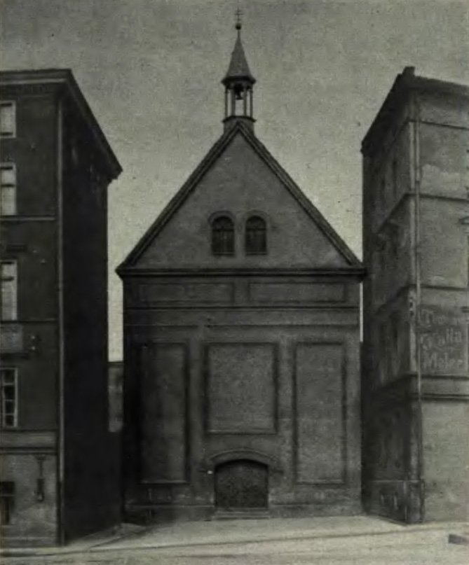 Sebastianskapelle in Oppeln, 1930